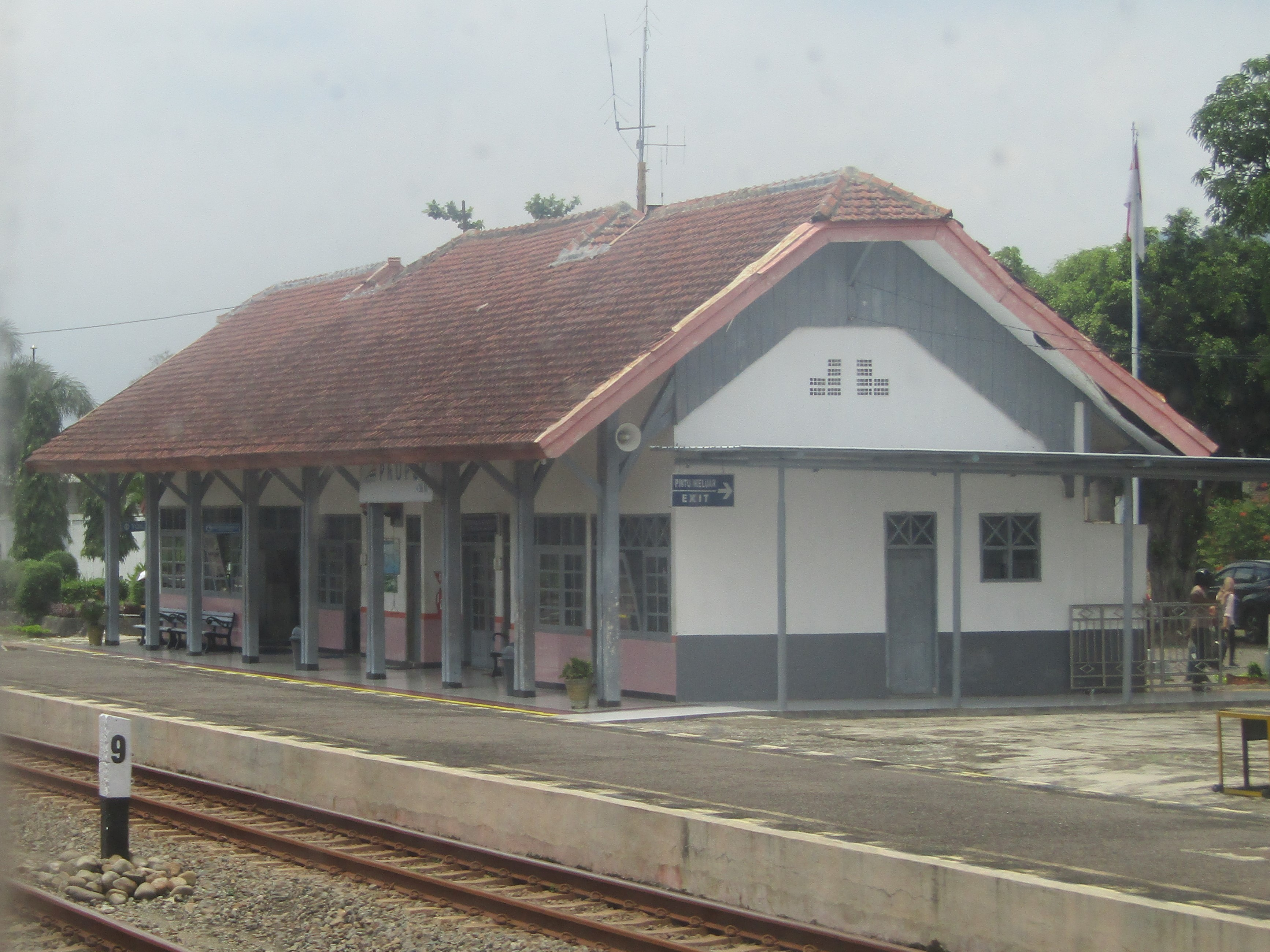 Tampak peron bangunan Stasiun Prupuk, 2019, dengan PPKA tunjuk-sebut Semboyan 1.